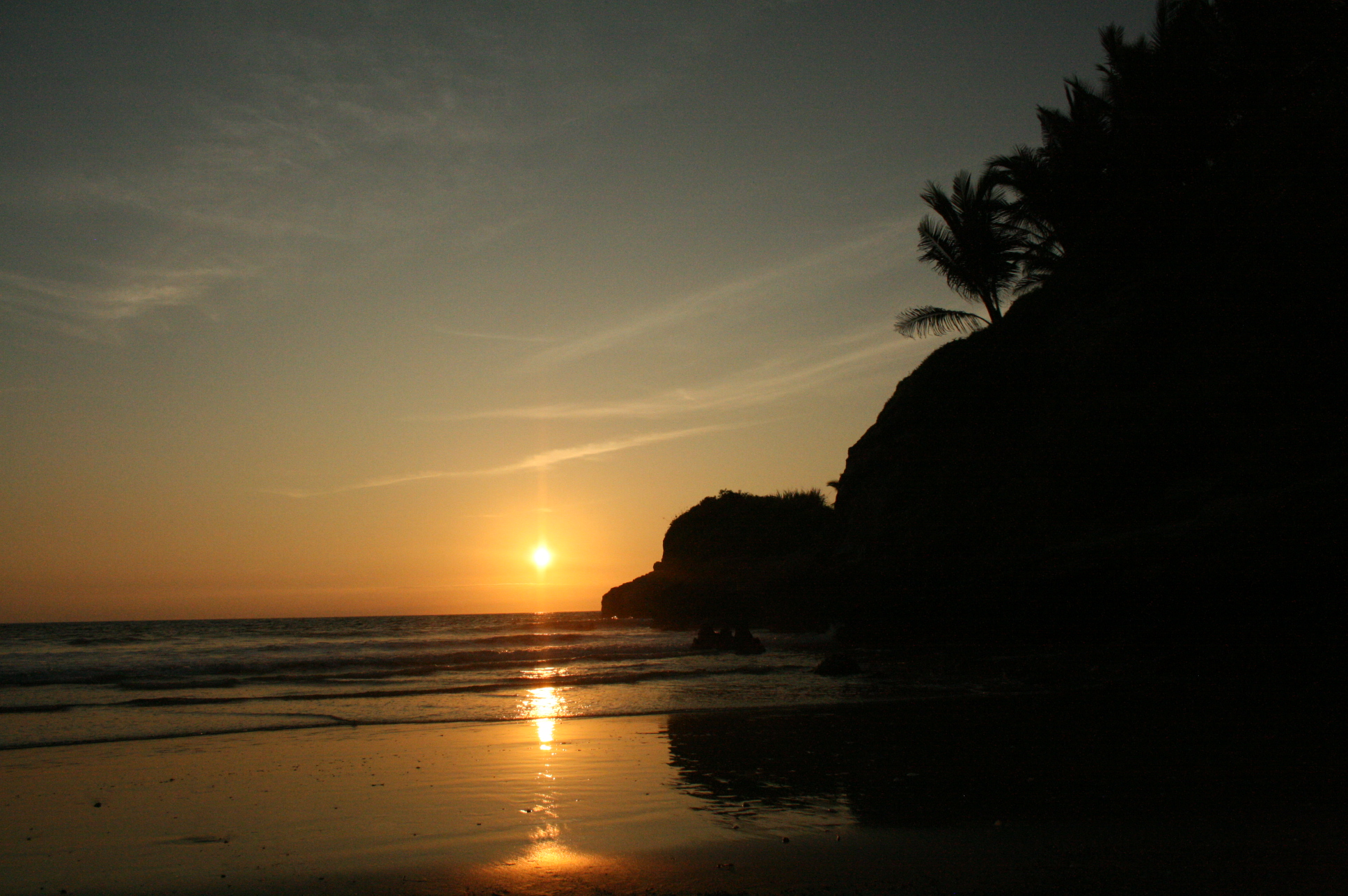 Playa de Mompiche Ecuador